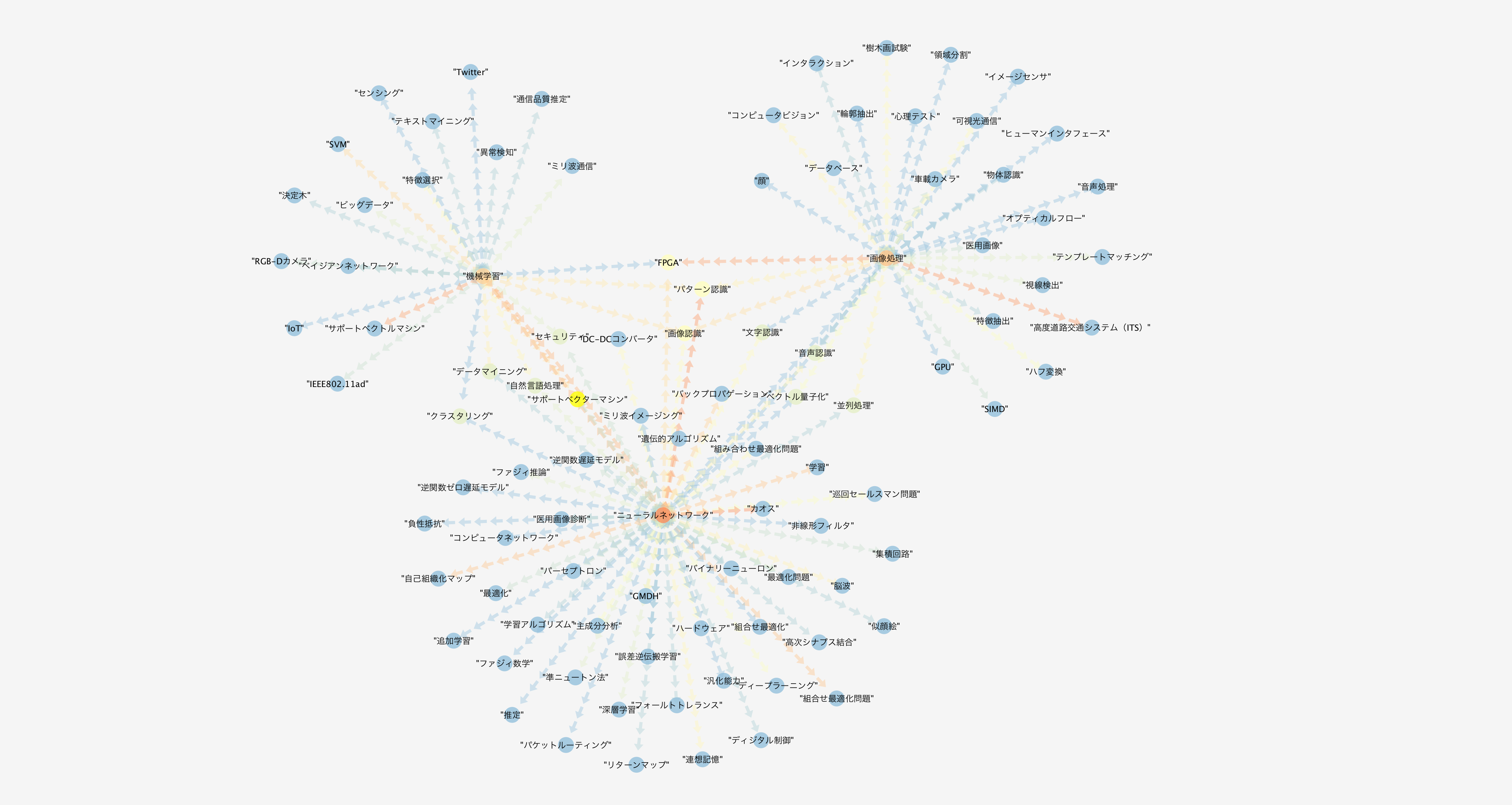 ニューラルネットワーク、機械学習、画像処理を起点とした共起語グラフ